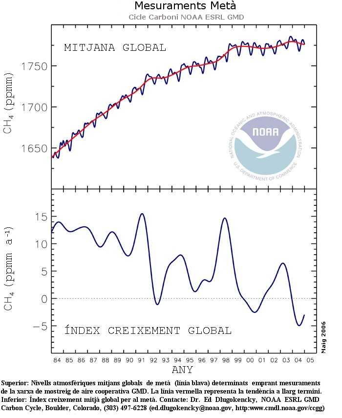 Mesuraments metà atmosfera